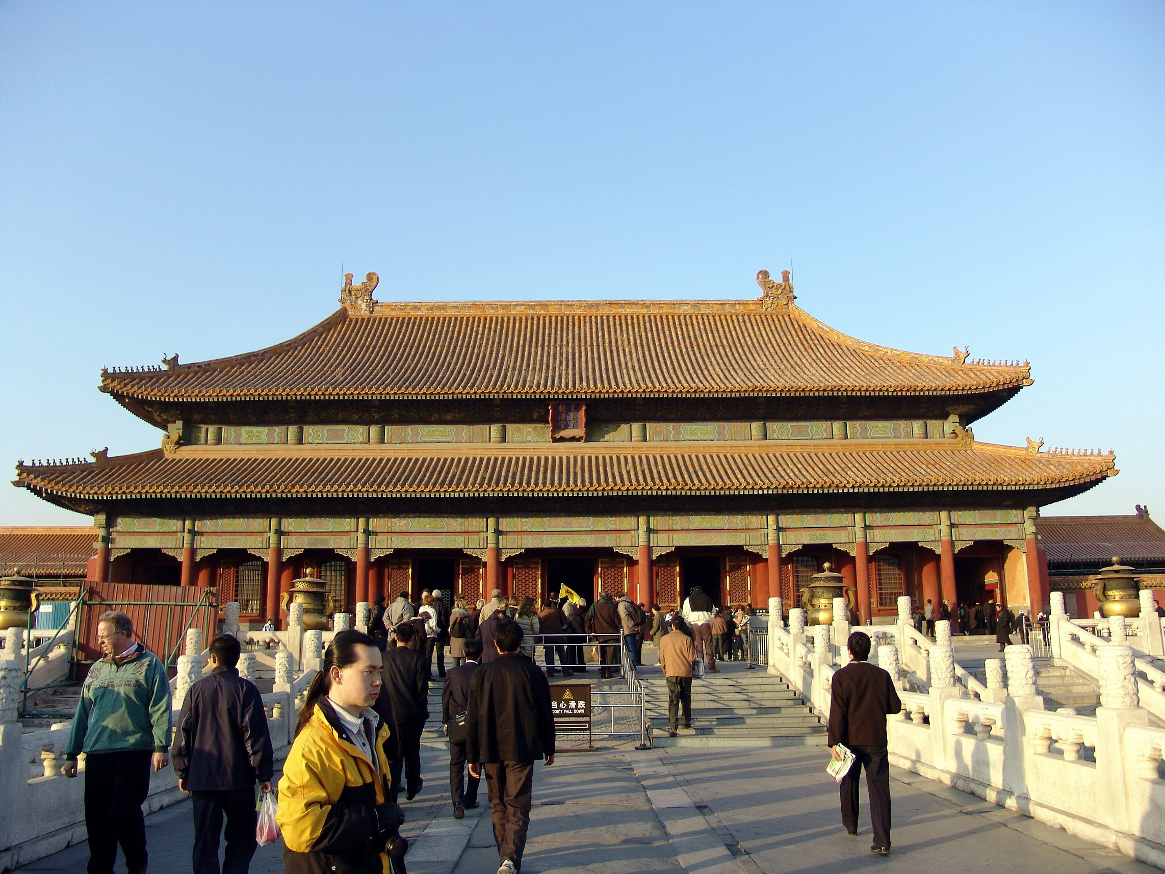 Forbidden City